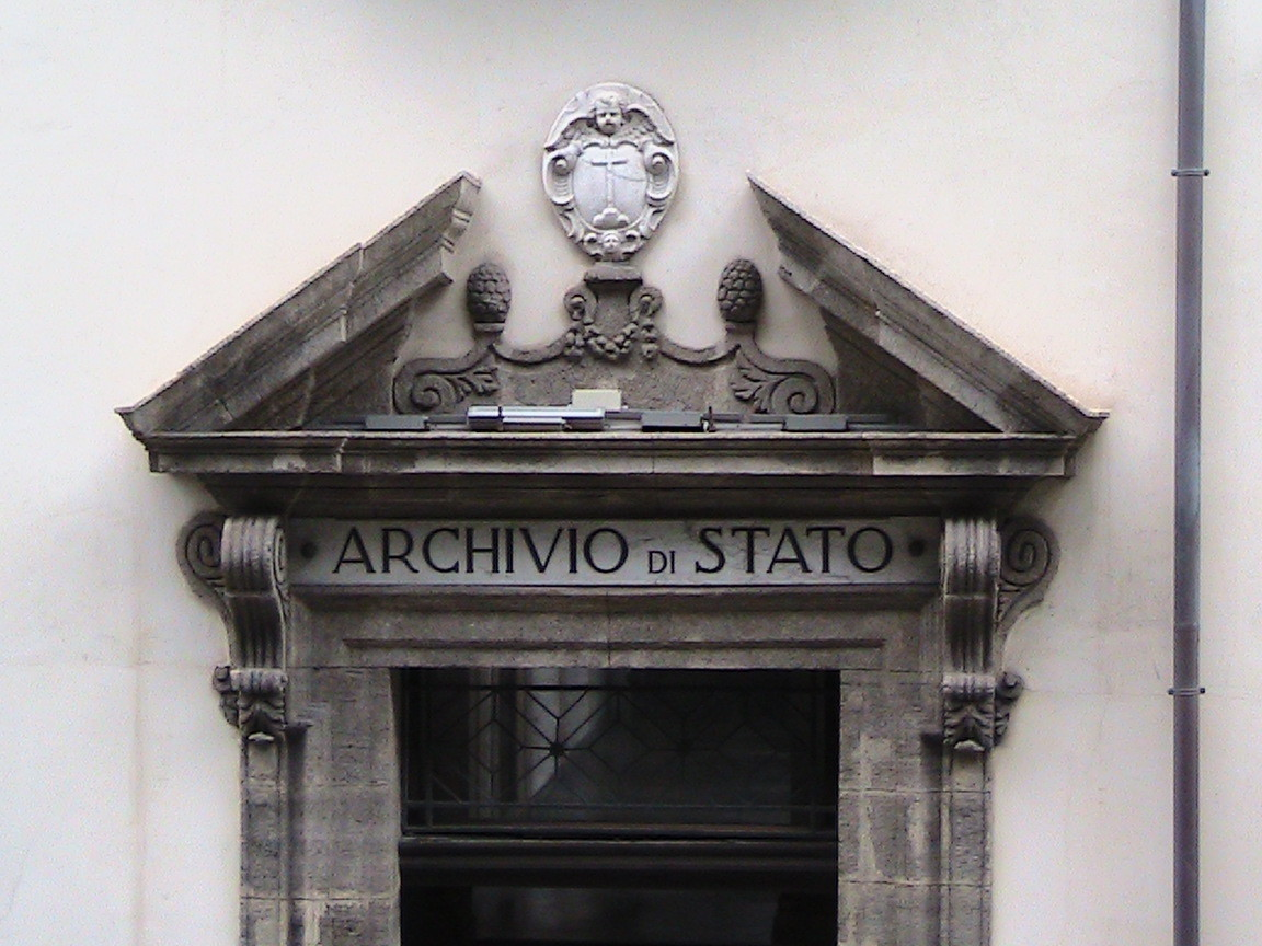 Eingang zum Staatsarchiv, Hauptsitz alla Catena